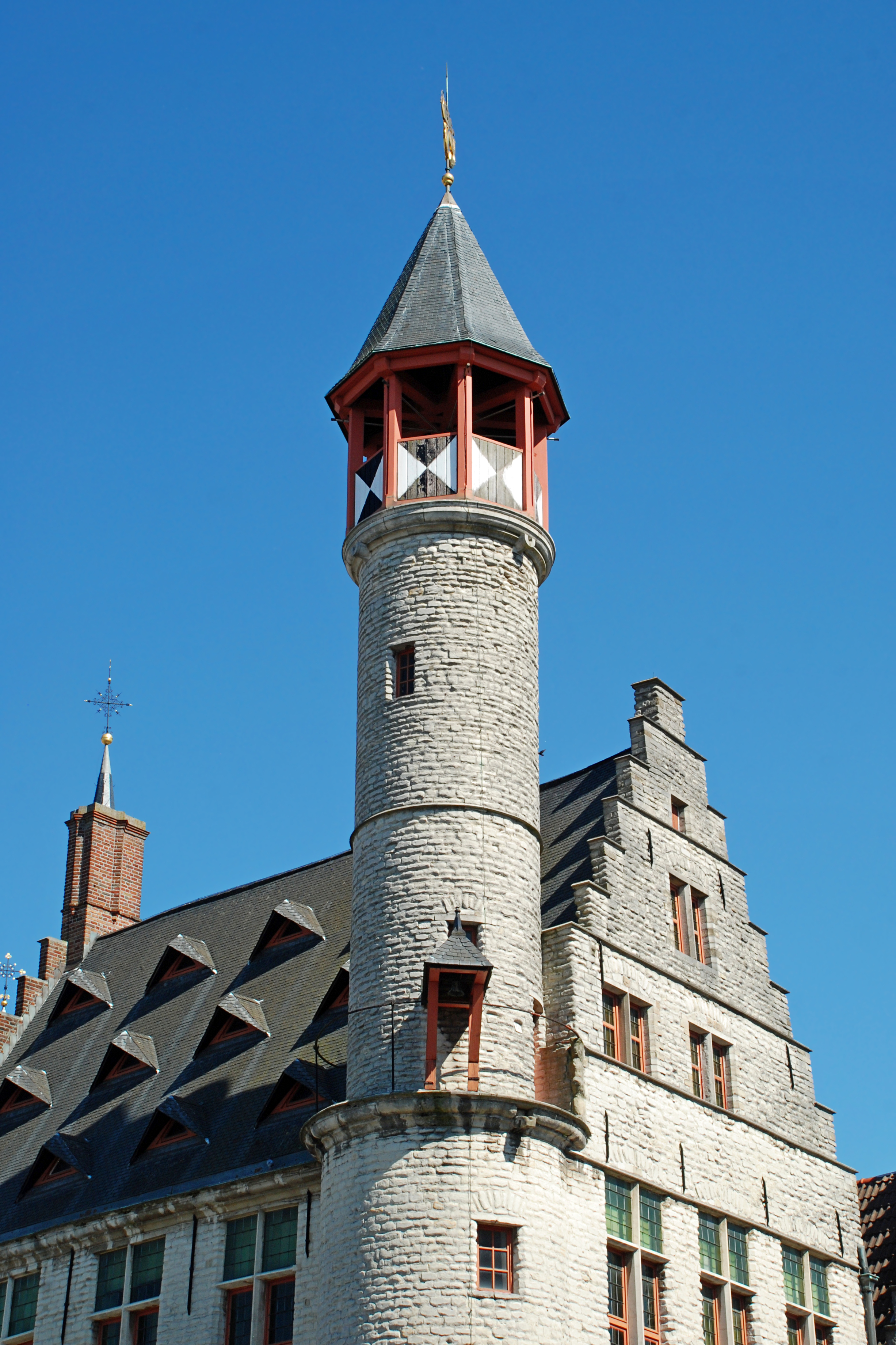 Belgique - Gand - Maison de la Corporation des Tanneurs - Het Toreken (gothique 1451-1483)